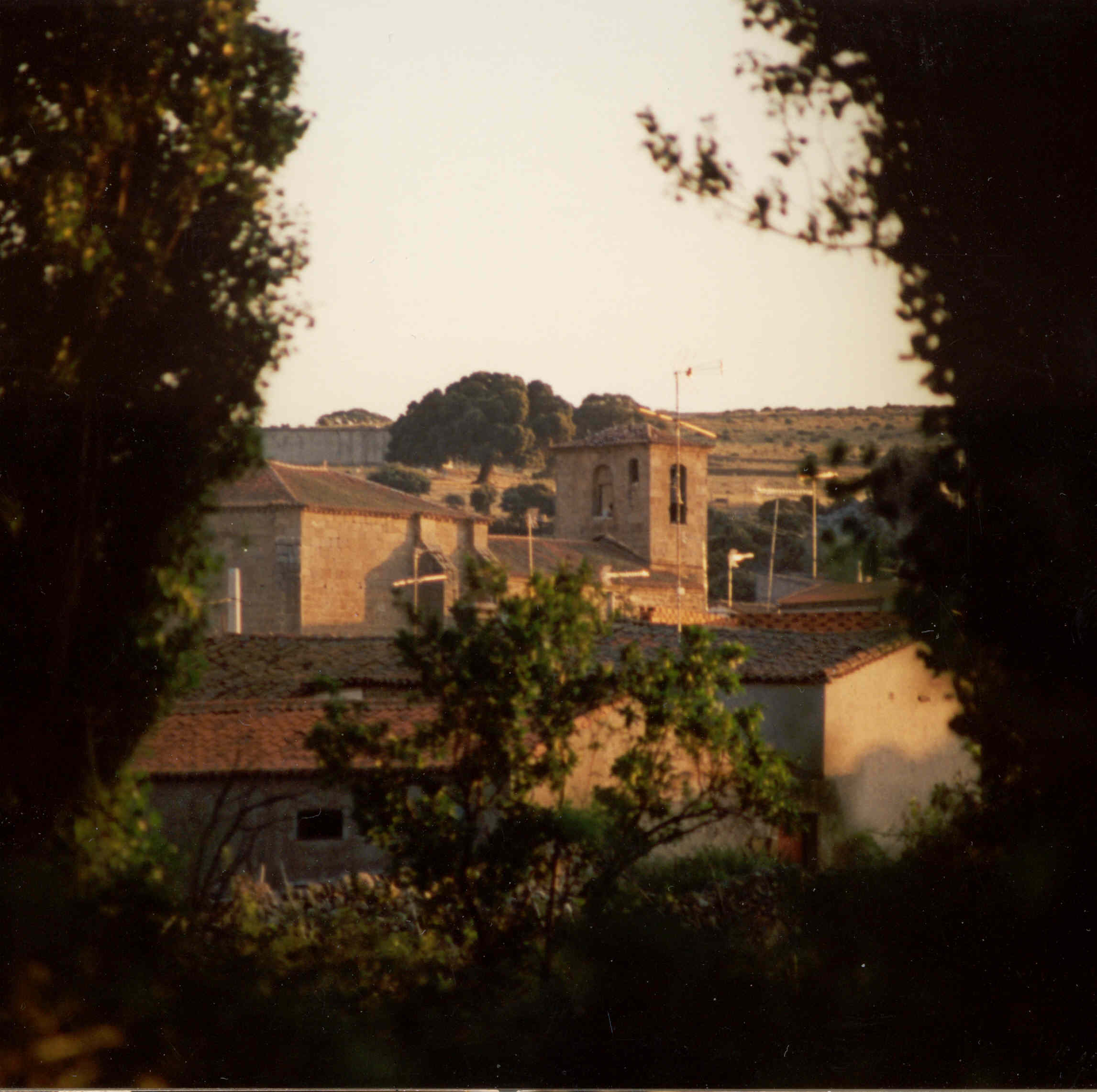 Vista de la Iglesia de Pascualcobo desde el noreste